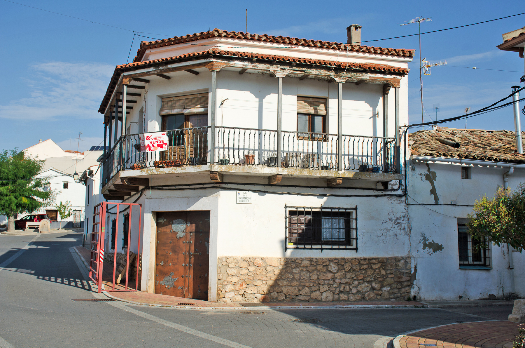 Calle al inicio del la calle de la Concentración Parcelaria, en Arcas del Villar (Cuenca)